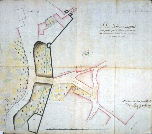 Fonds de l'Intendance. Plan de la rue projetée passant par les cordeliers de Vannes par Detaille de Keroyand, 1785. AD Ille-et-Vilaine C 704/18